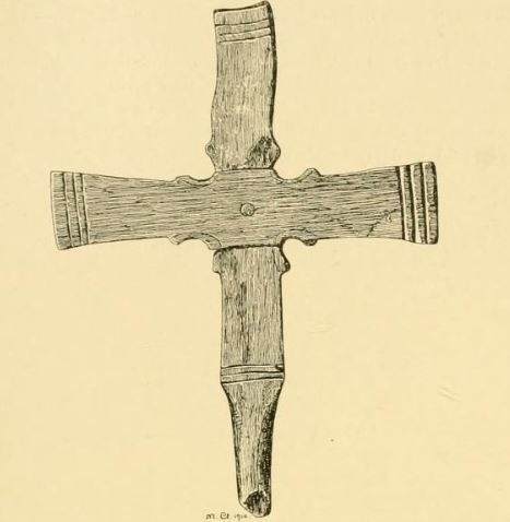 Croquis d'une croix retrouvée à Herjolfsnes